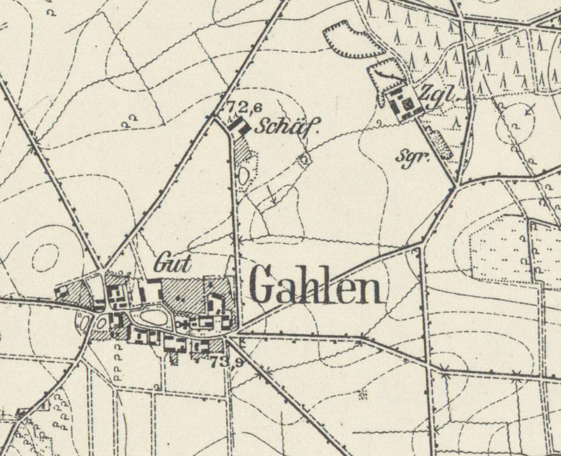 Gahlen, Gemeindeteil von Missen, Ortsteil der Stadt Vetschau/Spreewald, Lkr. Oberspreewald-Lausitz, Brandenburg, Ausschnitt aus dem Messtischblatt 4250 Vetschau/Spreewald von 1903 (Neudruck 1917)